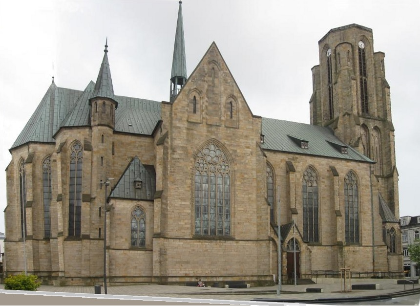 Nordansicht der Propsteikirche St. Urbanus in Gelsenkirchen-Buer (Photomontage)